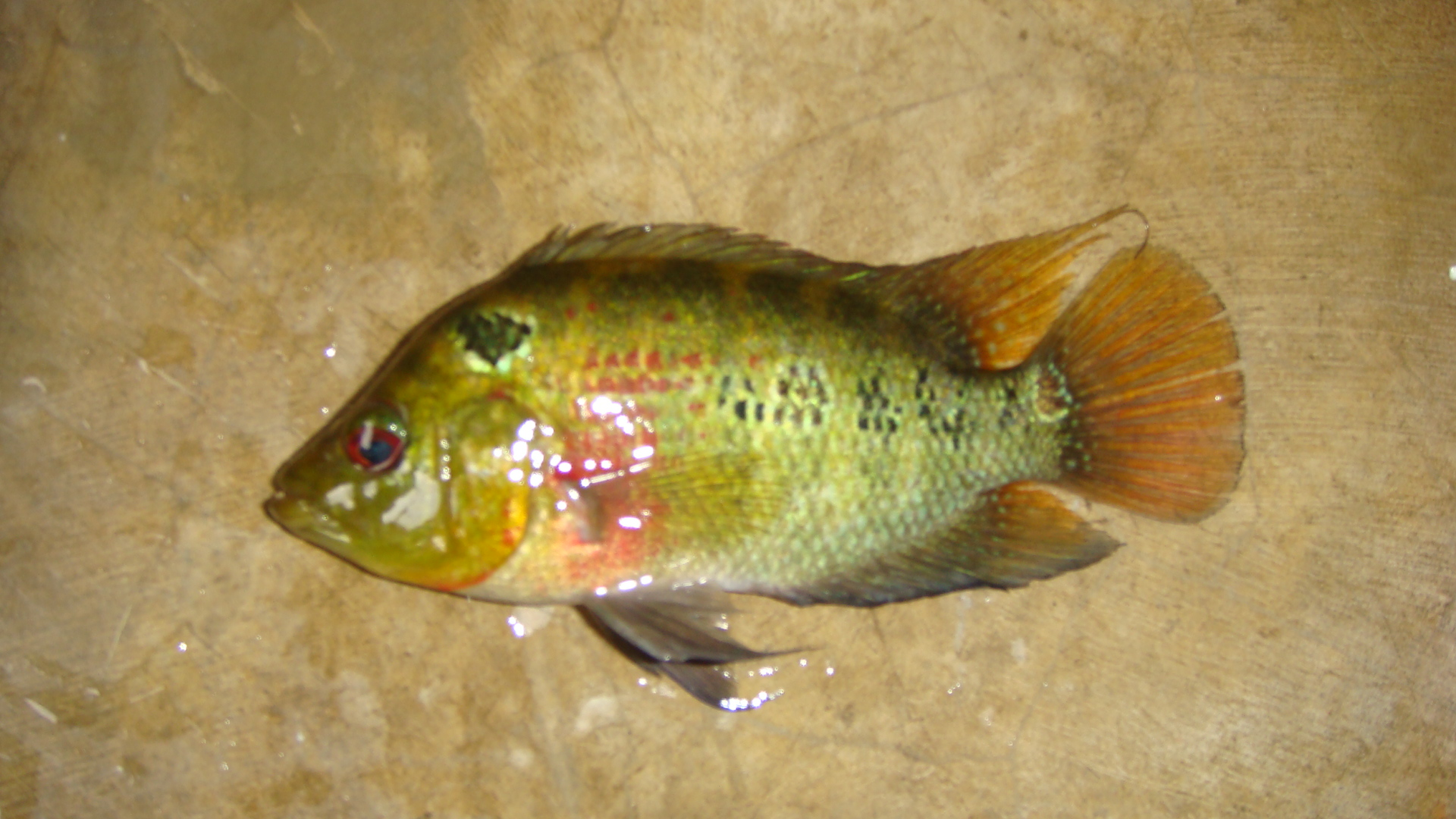 En estado de ahogamiento